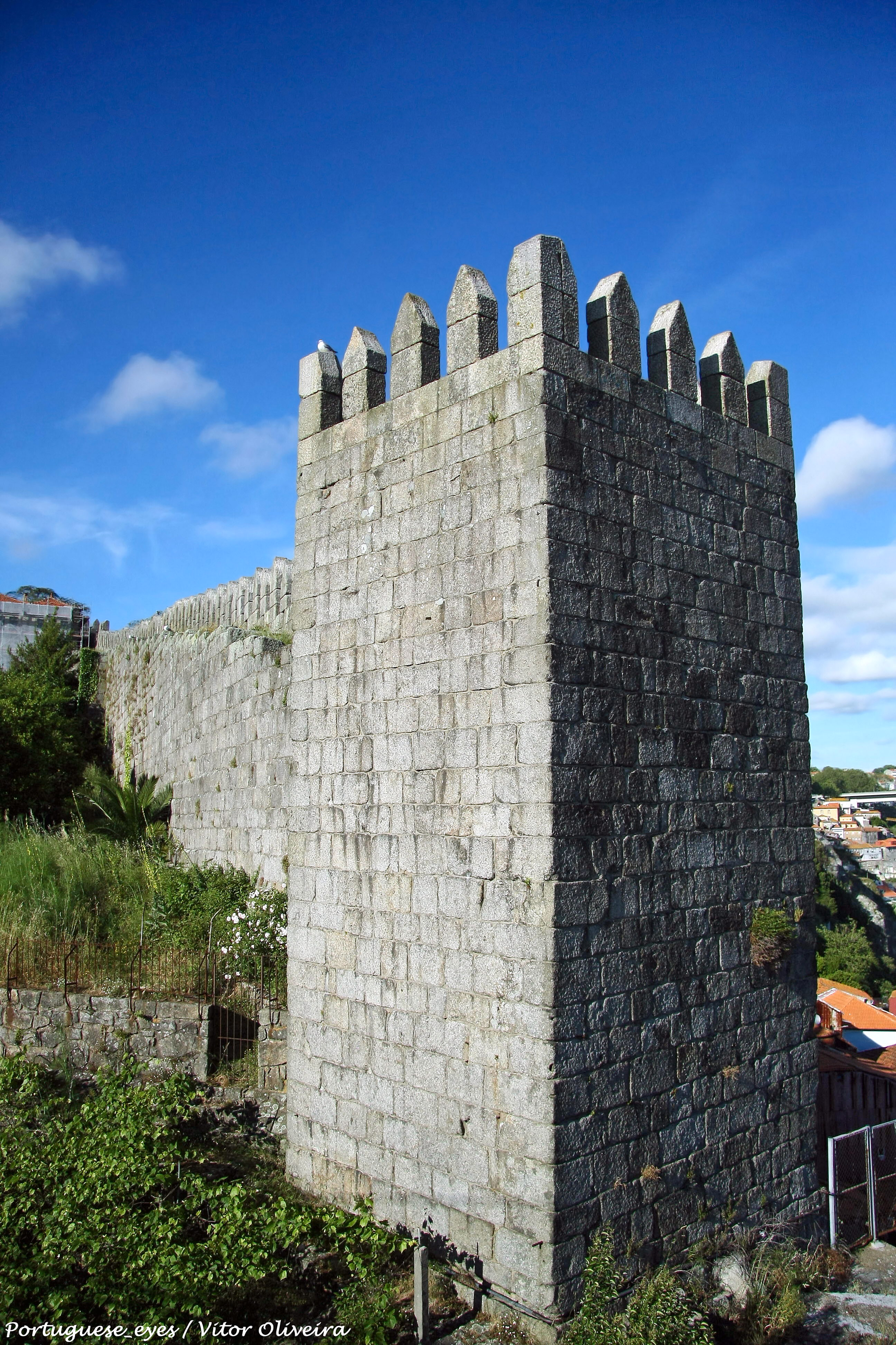 A muralha Fernandina veio substituir a antiga cerca alto-medieval, que no séc. XIV se mostrava demasiado pequena, face ao desenvolvimento da cidade. Foi reedificada por D. Fernando, de quem conservou o nome, entre 1368 e 1437, com verbas da Sisa do Vinho e tinha uma extensão de 3000 passos e altura média de 30 pés. Era guarnecida de ameias e reforçada por numerosos cubelos e torres quadradas. Presentemente existem ainda dois trechos, um localizado junto à Rua Arnaldo Gama intitulado Trecho dos Guindais e o outro junto das Escadas do Caminho Novo, intitulado Trecho do Caminho Novo. Ponto integrante da Rota Urbana do Vinho. visitporto.travel/Visitar/Paginas/Viagem/DetalhesPOI.aspx...